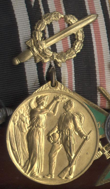 Die Deutsche Ehrendenkmünze des Weltkriegs, vergoldete Variante, am schwarz-weiß-roten Ordensband, Vorderseite mit aufgelegtem Kampfabzeichen (Deutsche Ehrenlegion).